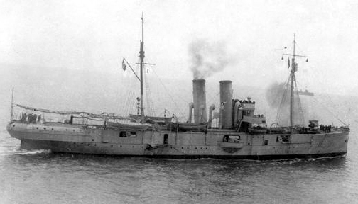 Fotografía del Crucero Lima en el año de 1933.